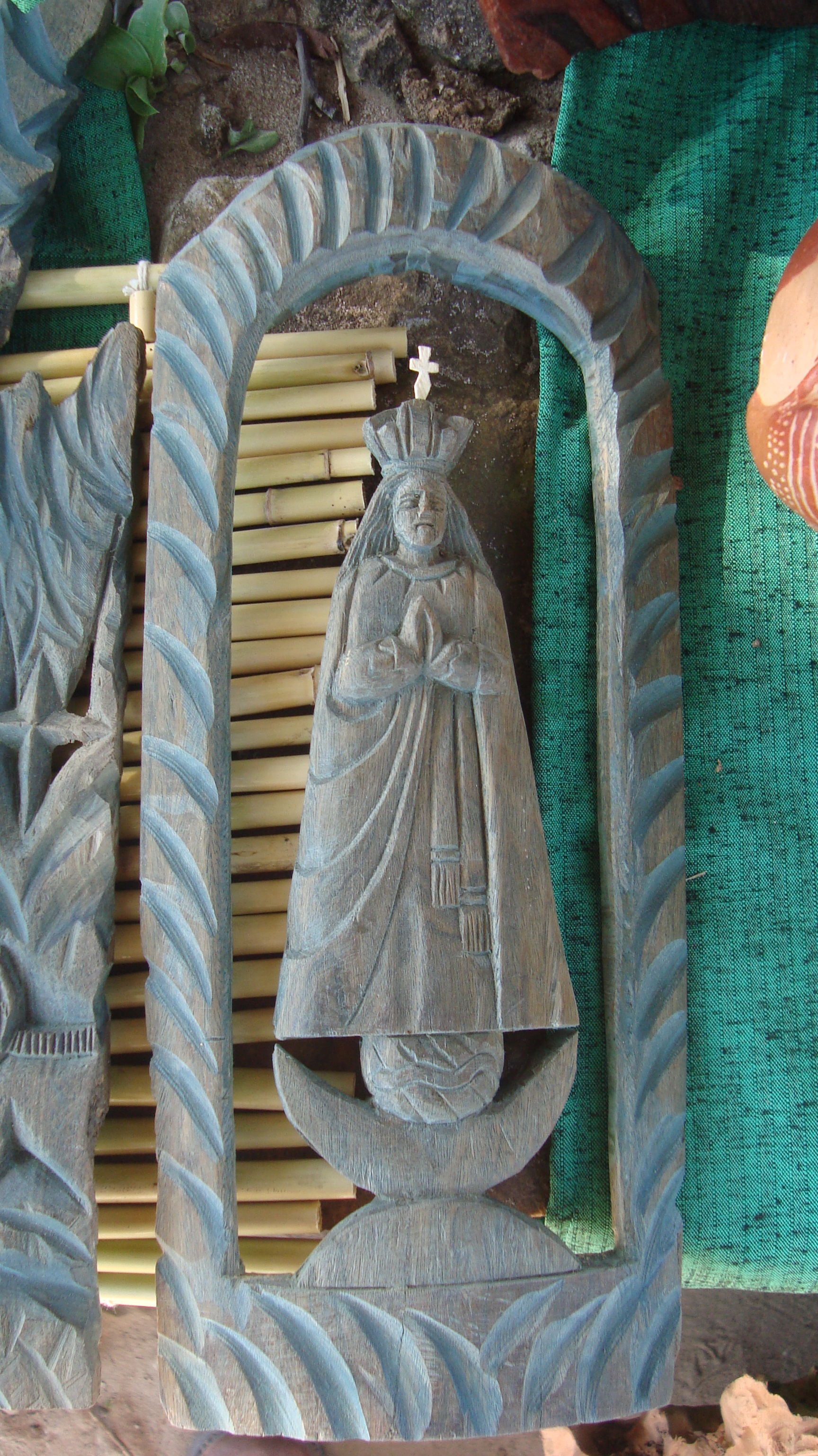 Imagen de la Virgen de los Milagros de Caacupé tallada en madera de palo santo por un artesano de Tobati (Paraguay).